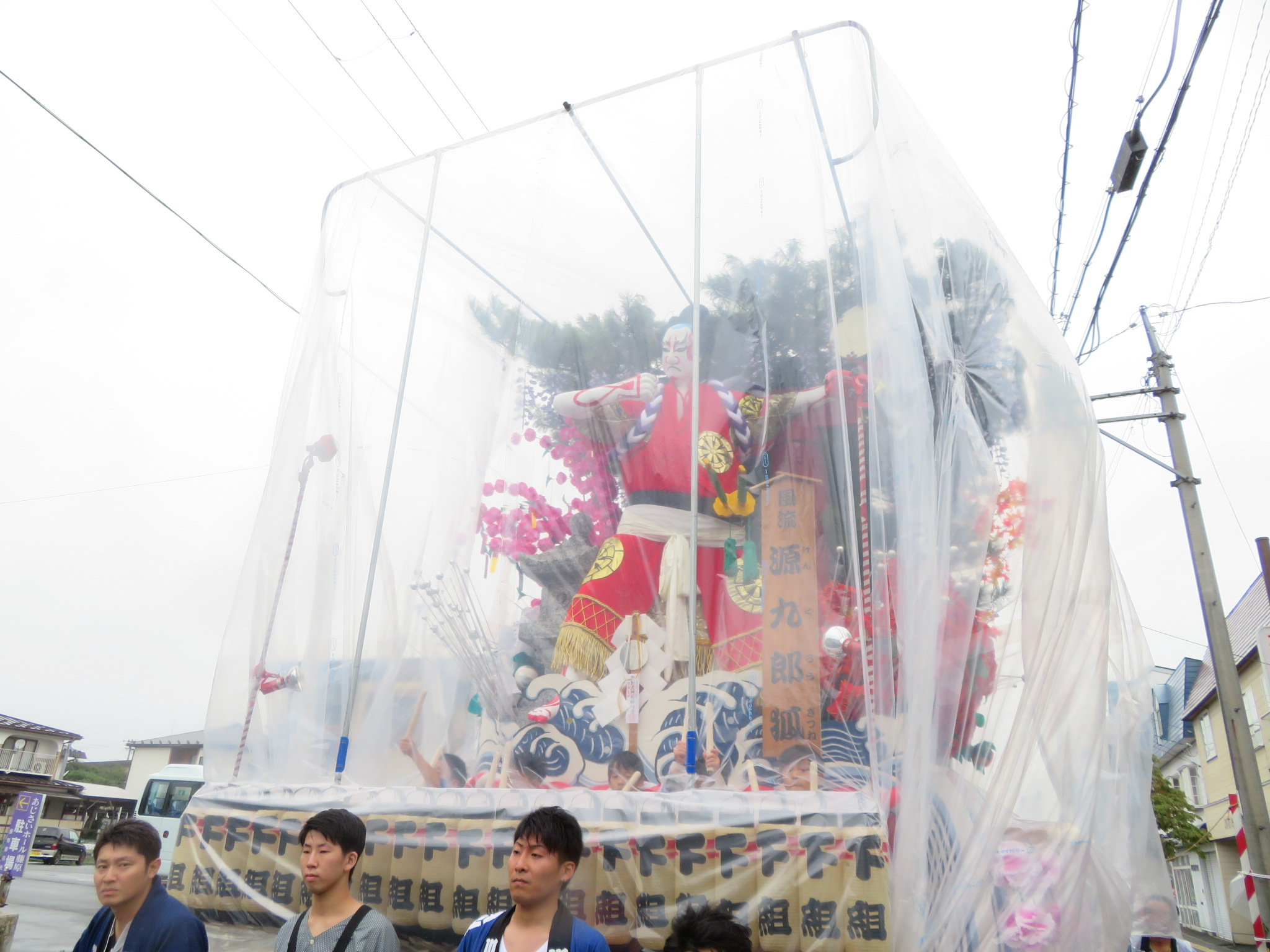 雨よけ